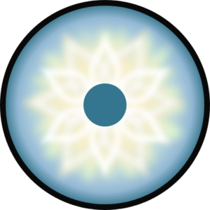 tenseigan